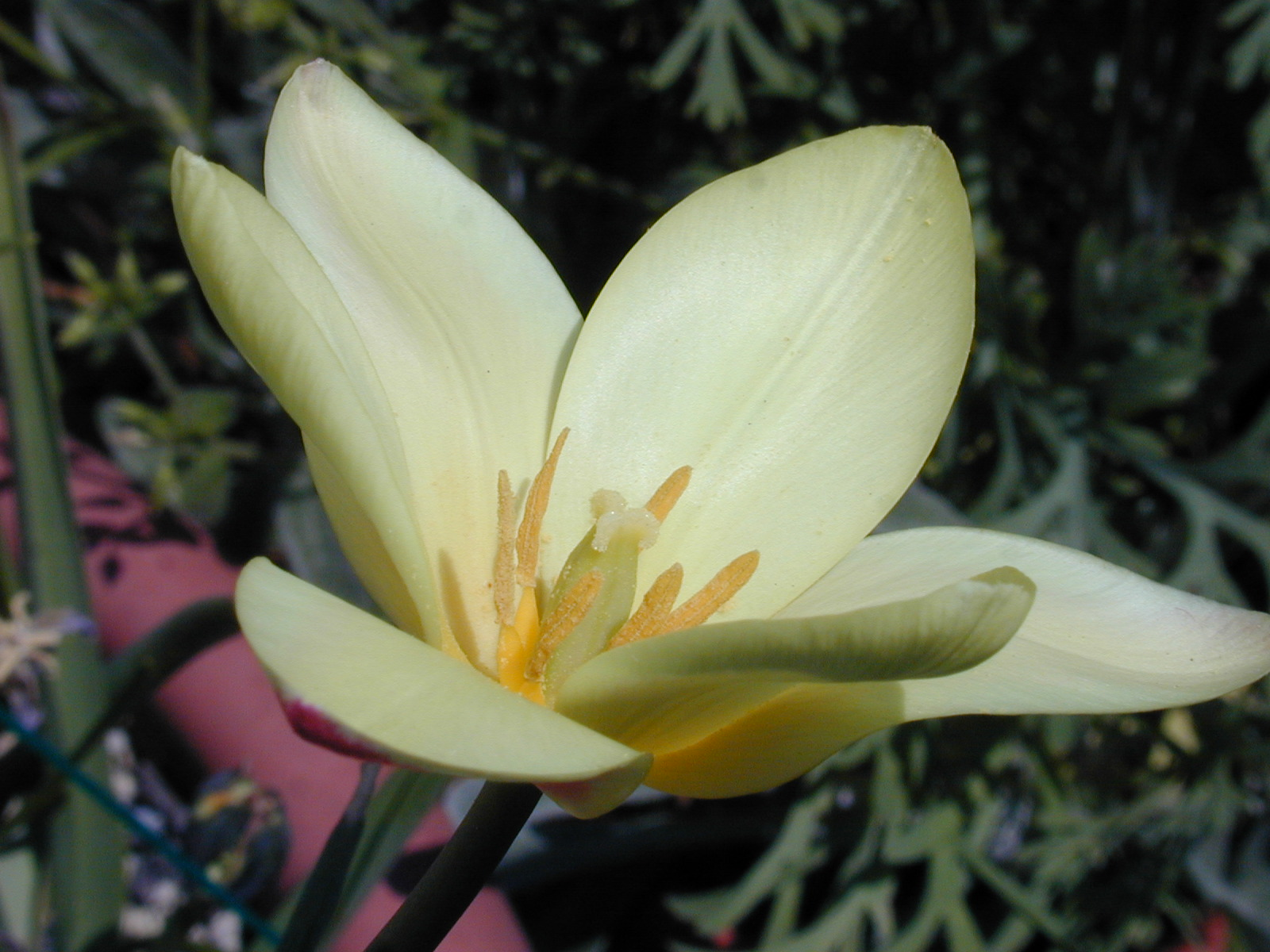 Tulipa